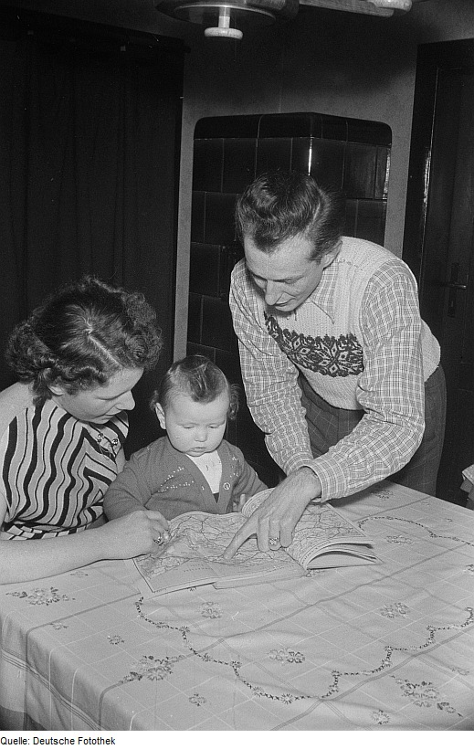 Original image description from the Deutsche Fotothek Portrait der Familie Brummer, die zur Urlaubsplanung in einen Atlas sieht